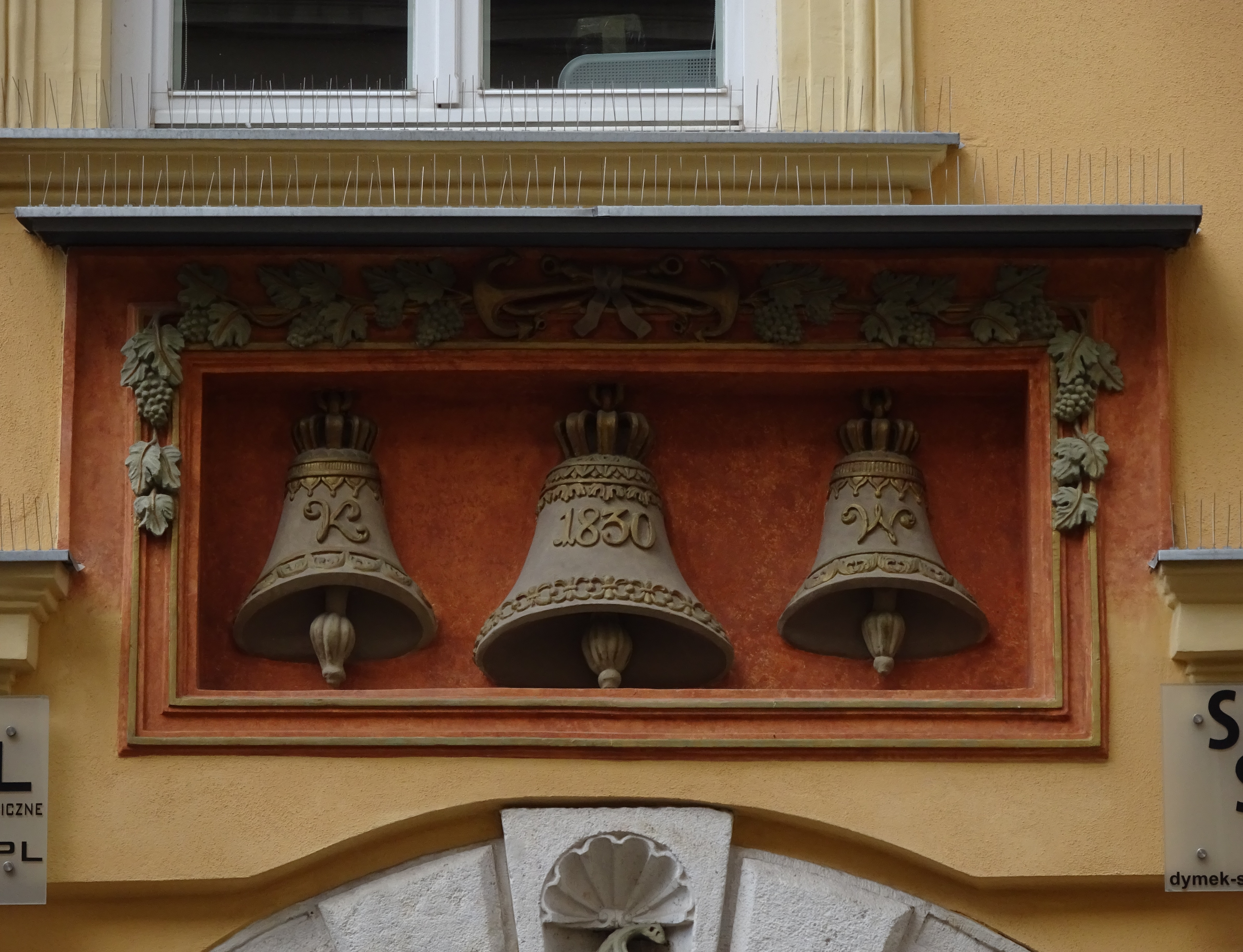 Godło Kamienicy Podedzwony w Krakowie przy ulicy Floriańskiej 24.